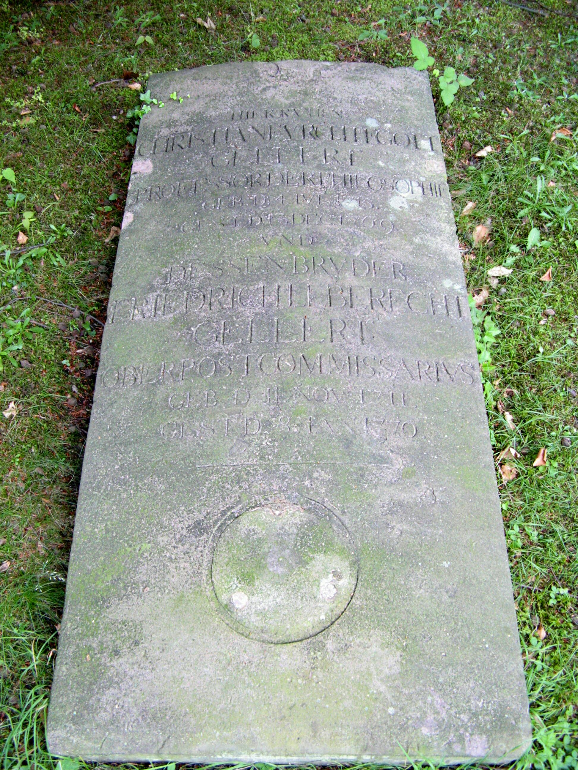 Grabplatte von Christian Fürchtegott Gellert und dessen Bruder Friedrich Leberecht Gellert auf dem Leipziger Südfriedhof, I. Abteilung. Die Platte hängt seit 2009 an einer Wand im Hof des Grassimuseums Leipzig.